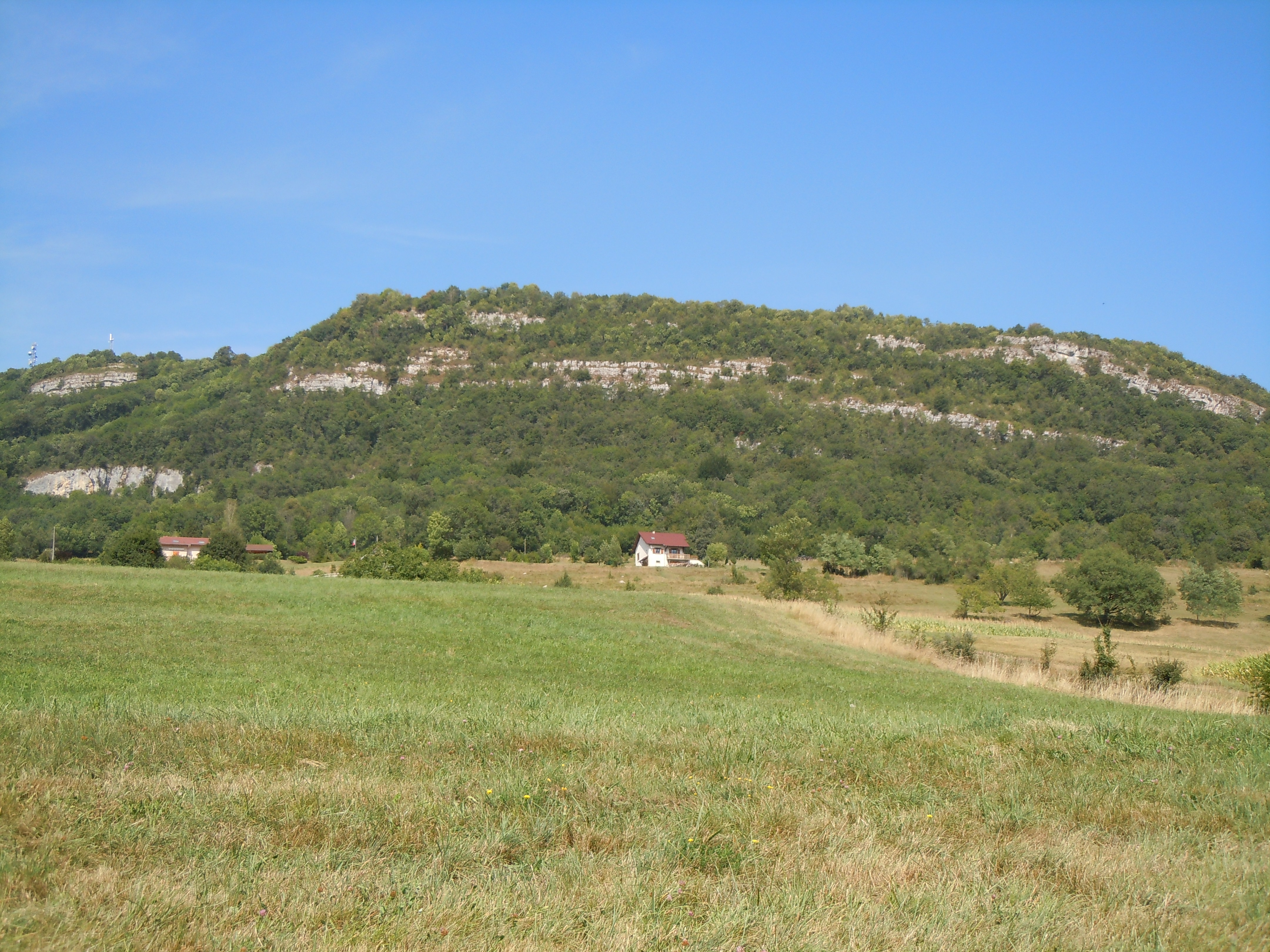 Pelouses de Gresin - Gresin - Savoie